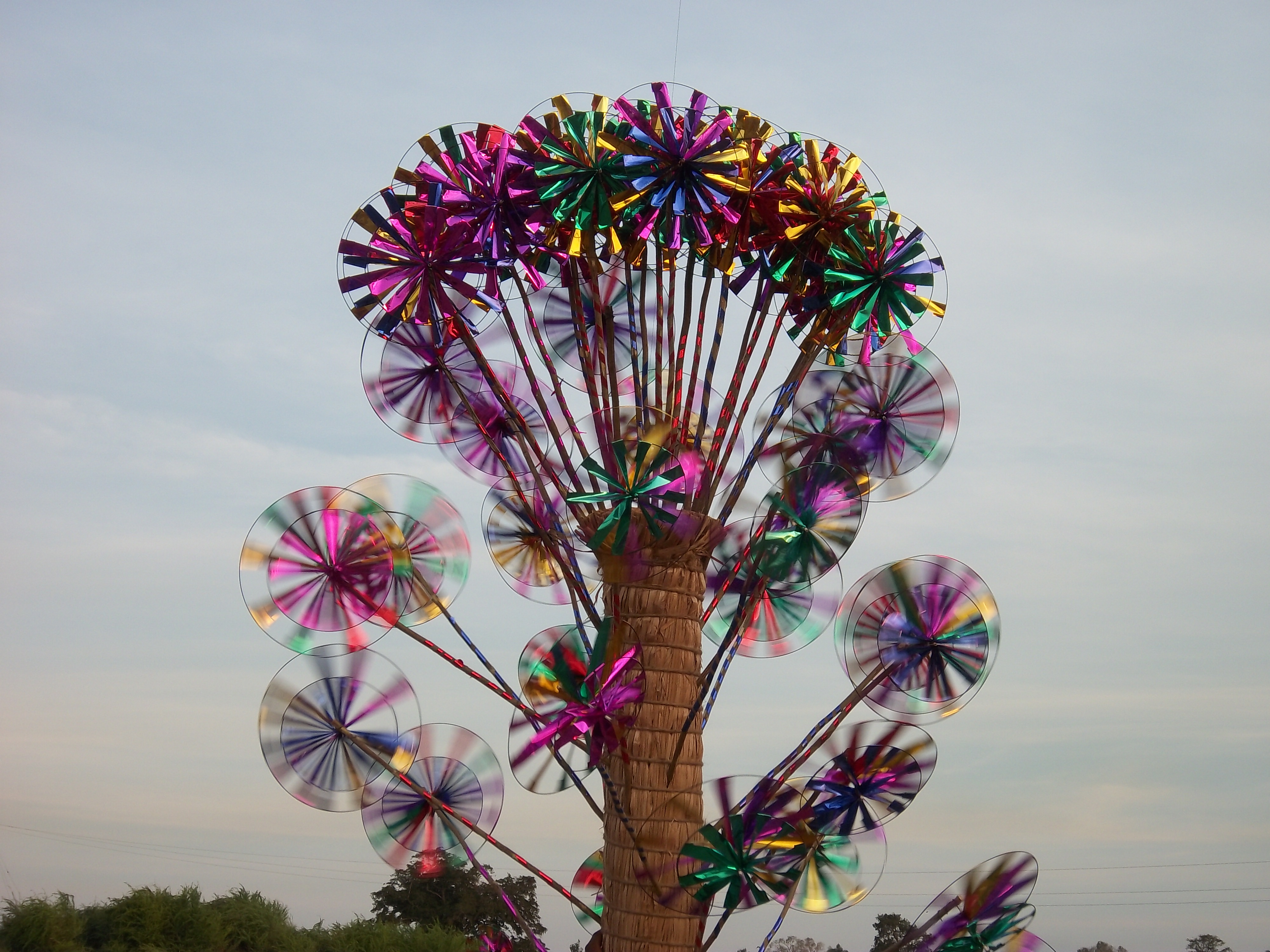 காத்தாடி - குழந்தைகள் இதை கையில் வைத்துக்கொண்டு காற்றுக்கு எதிர் திசையில் ஓடும்போது இது சுற்றும்.